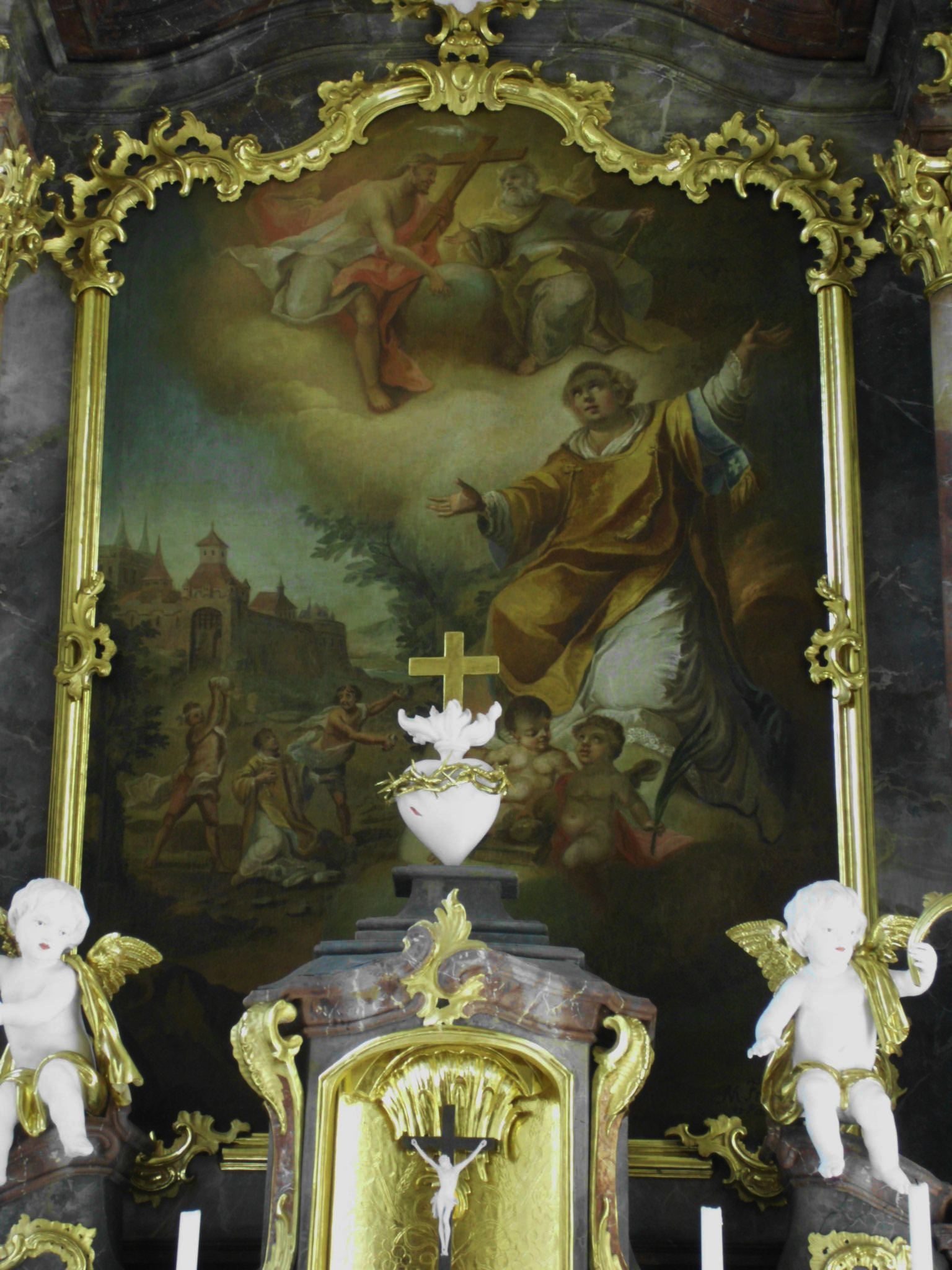 Kath. Kirche St. Josef in Ramsberg (Landkreis Weißenburg-Gunzenhausen), barockes Altarblatt mit der Darstellung des hl. Stephanus